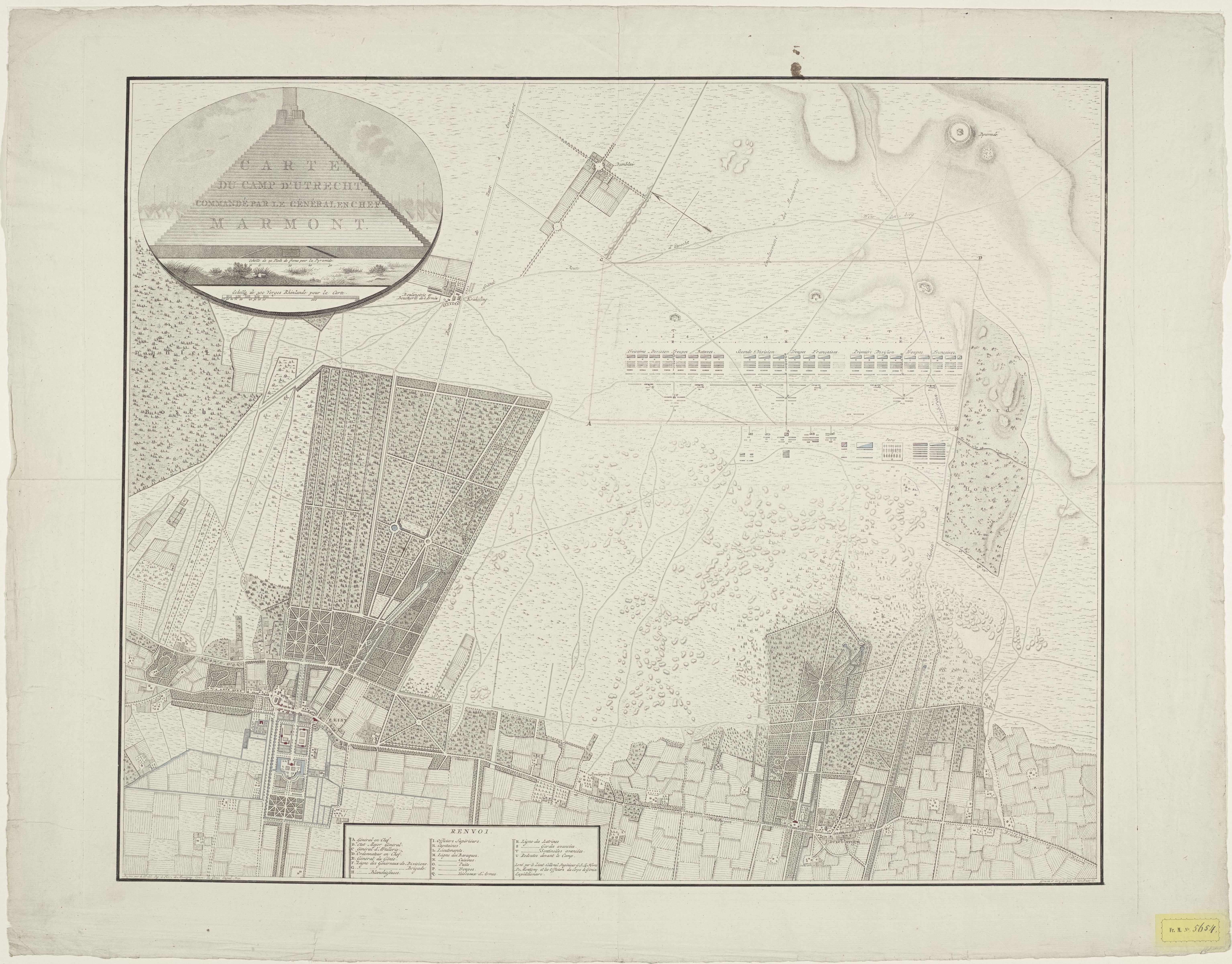 IdentificatieTitel(s): Kaart met het legerkamp bij Zeist, 1805Carte du camp d'Utrecht, commandé par le général en chef Marmont (titel op object)Objecttype: prent kaart Objectnummer: RP-P-1911-584Catalogusreferentie: FMH 5654Atlas van Stolk 6003Opschriften / Merken: etiket, rechtsonder, gedrukt en handgeschreven: ‘Fr. M. No. 5654’verzamelaarsmerk, verso, gestempeld: Lugt 2228Omschrijving: Kaart van het gebied tussen Zeist en Driebergen met het legerkamp van het Bataafse en Franse leger onder leiding van generaal Auguste de Marmont, 1804-1805. Linksboven een inzet met een gezicht op de pyramide van Austerlitz, opgetrokken in 1804 door de aldaar gelegerde soldaten.VervaardigingVervaardiger: prentmaker: Cornelis van Baarsel (vermeld op object)cartograaf: Gilles Johannes le Fèvre de Montigny (vermeld op object)Plaats vervaardiging: NederlandDatering: 1805Fysieke kenmerken: ets, deels met de hand gekleurdMateriaal: papier Techniek: etsen / met de hand kleurenAfmetingen: plaatrand: h 620 mm × b 740 mmOnderwerpWat: maps of separate countries or regionsWanneer: 1805 - 1805Waar: Pyramide van AusterlitzZeistDriebergenVerwerving en rechtenCredit line: Schenking van de heer M. Onnes van NijenrodeVerwerving: schenking 1911Copyright: Publiek domein